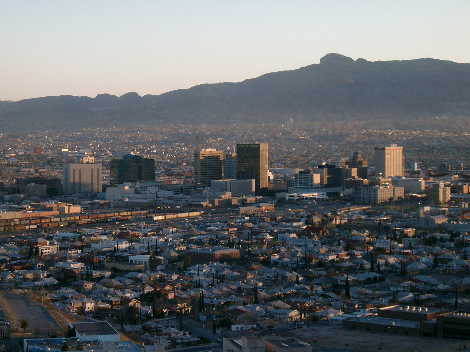 Blick auf El Paso vom Scenic Drive aus (im Hintergrund das mexikanische Juarez)